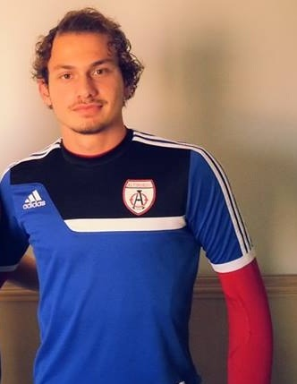 Mertan Caner Öztürk profil